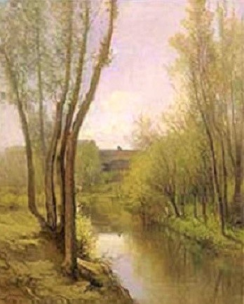 "Primi solchi", olio su tela, 134 x 62 cm., Galleria d'arte moderna, Torino